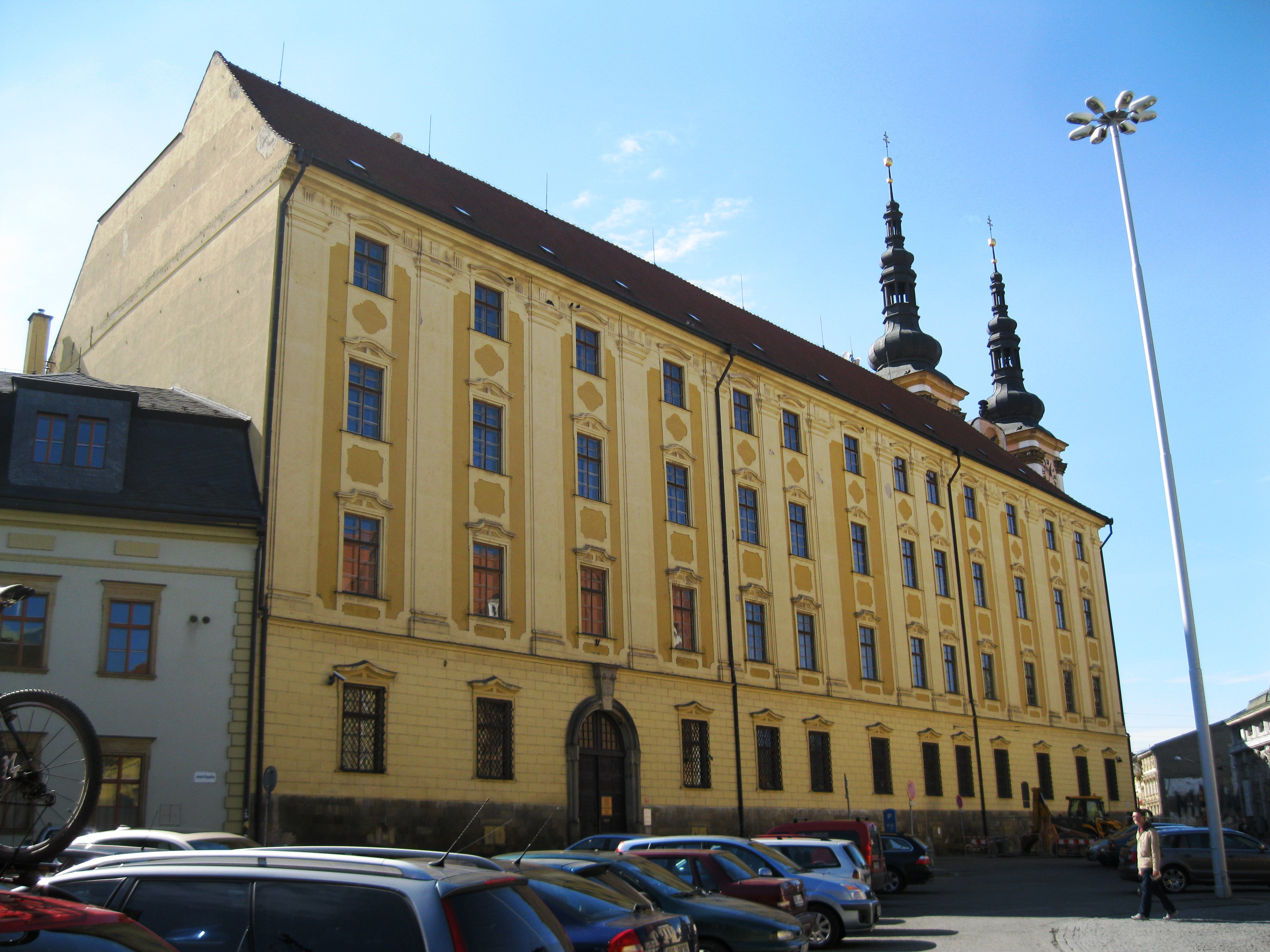 Kolej - bývalá jezuitská kolej (Olomouc), nám. Republiky 408/4, Olomouc